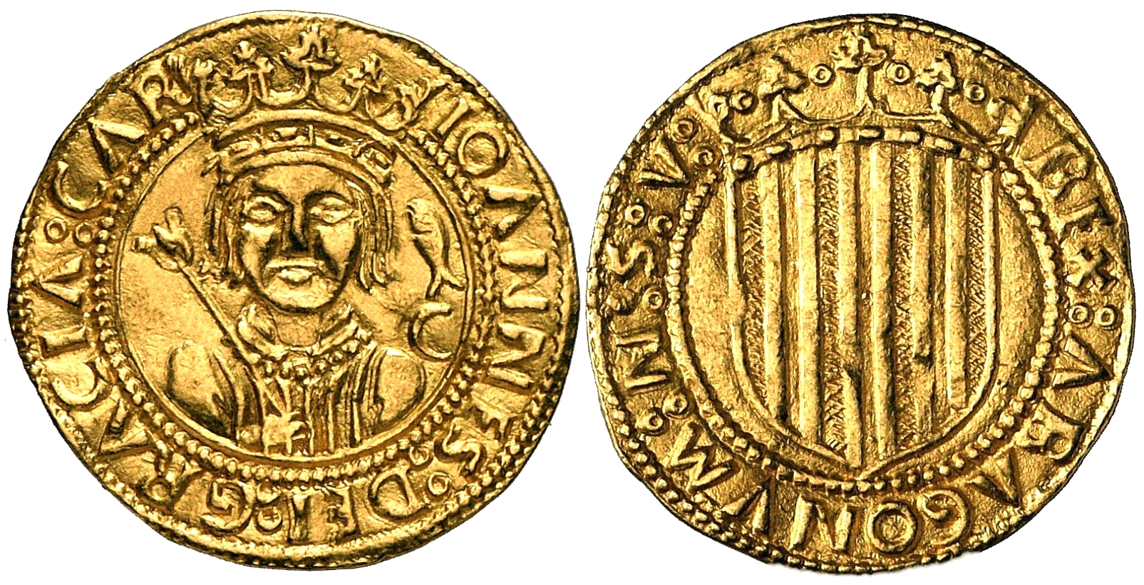 Ducado o Escudo de oro aragonés de Juan II de Aragón acuñado en la ceca de Zaragoza en 1460 (leyenda C bajo un pequeño pez, que remite a Çaragoça) Anverso: Busto real de frente coronado con cetro, a ambos lados, marcas de impresor y ceca, leyenda I C y en el exterior IOANES DEI GRATIA CAR Reverso: Armas de Aragón con leyenda REX ARAGONVM N*S*V